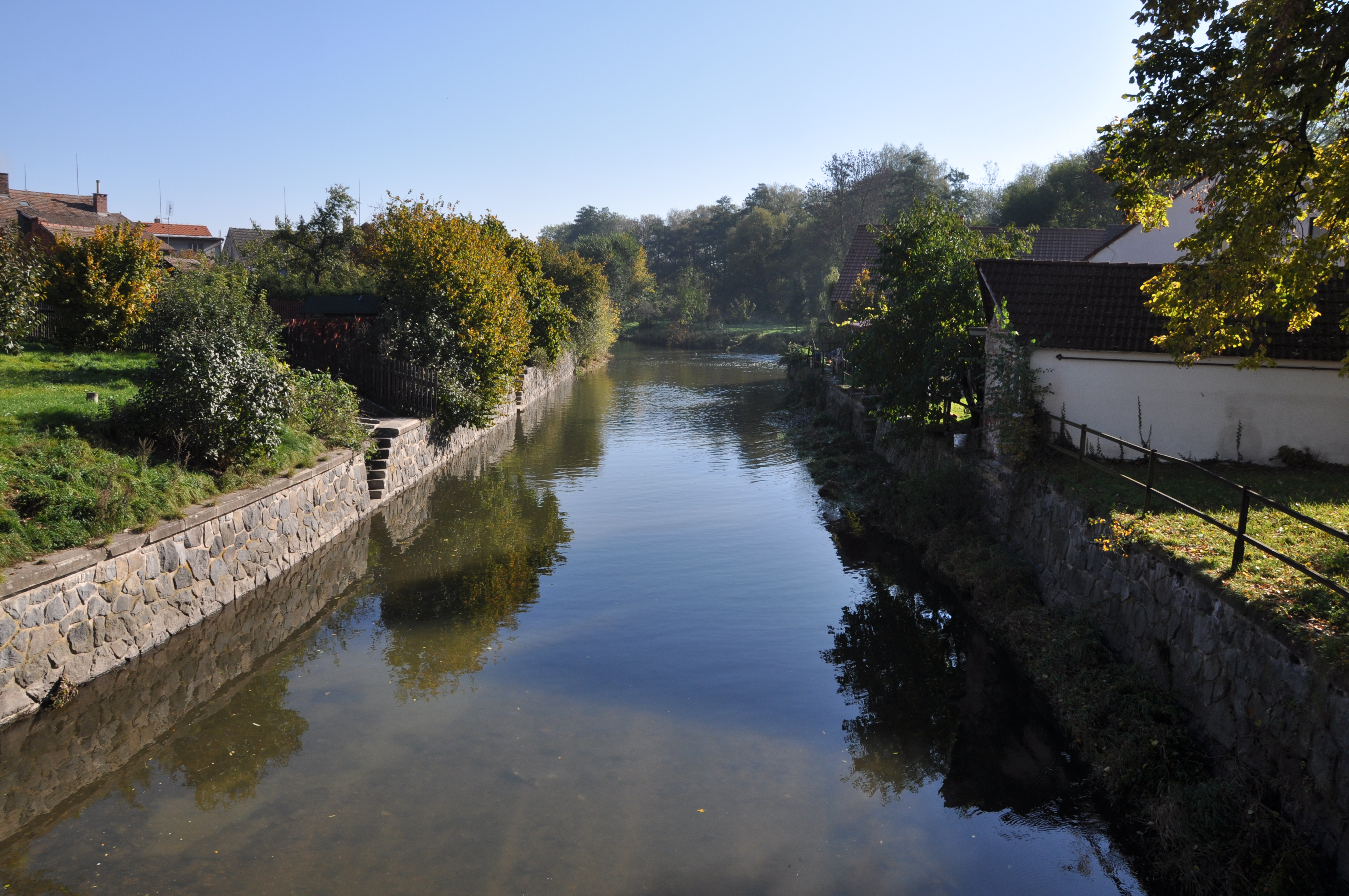 Potok Dědina v Třebechovicích